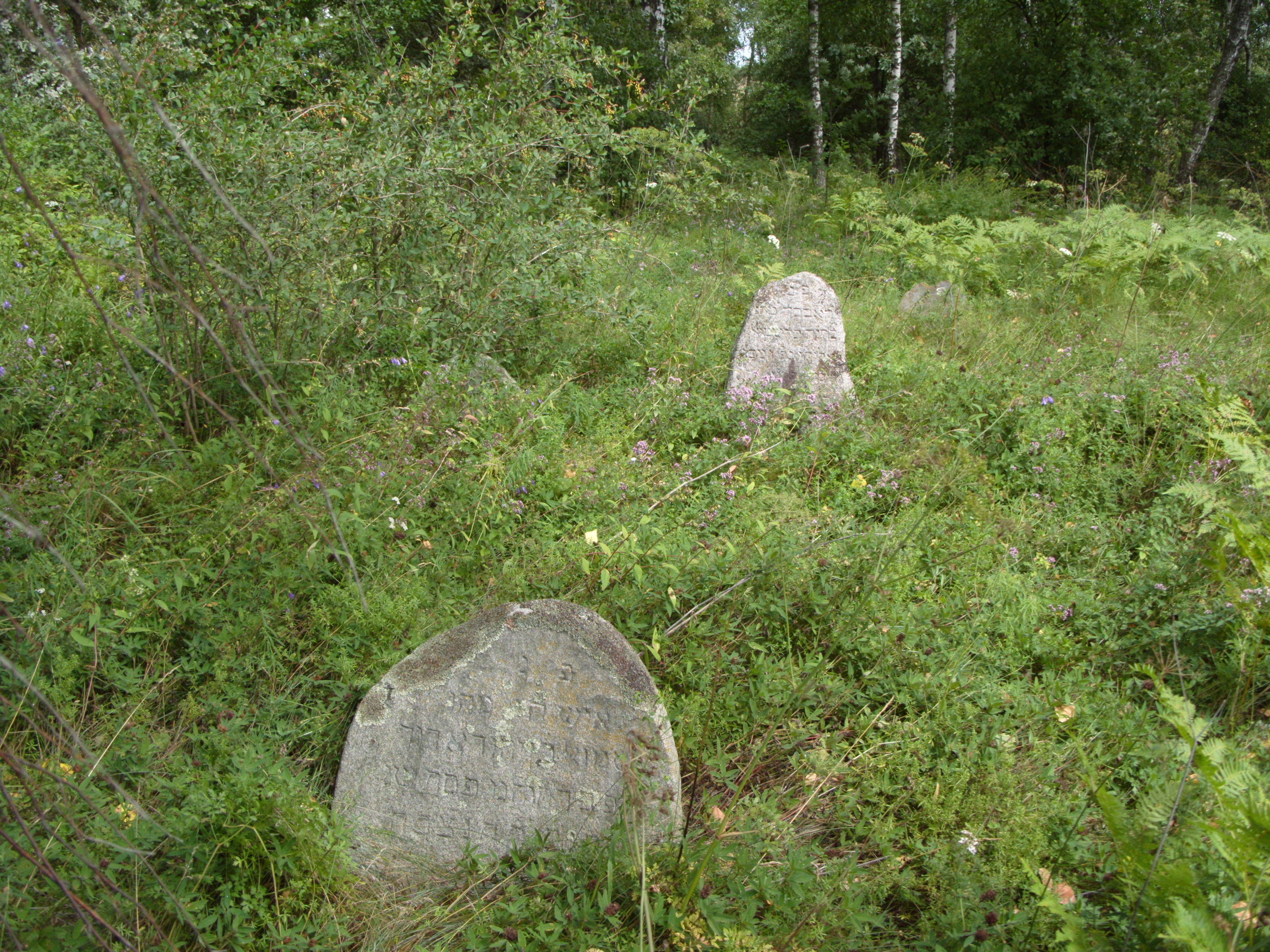 Беларуская (тарашкевіца): Вёска Сяліба, габрэйскія могілкі